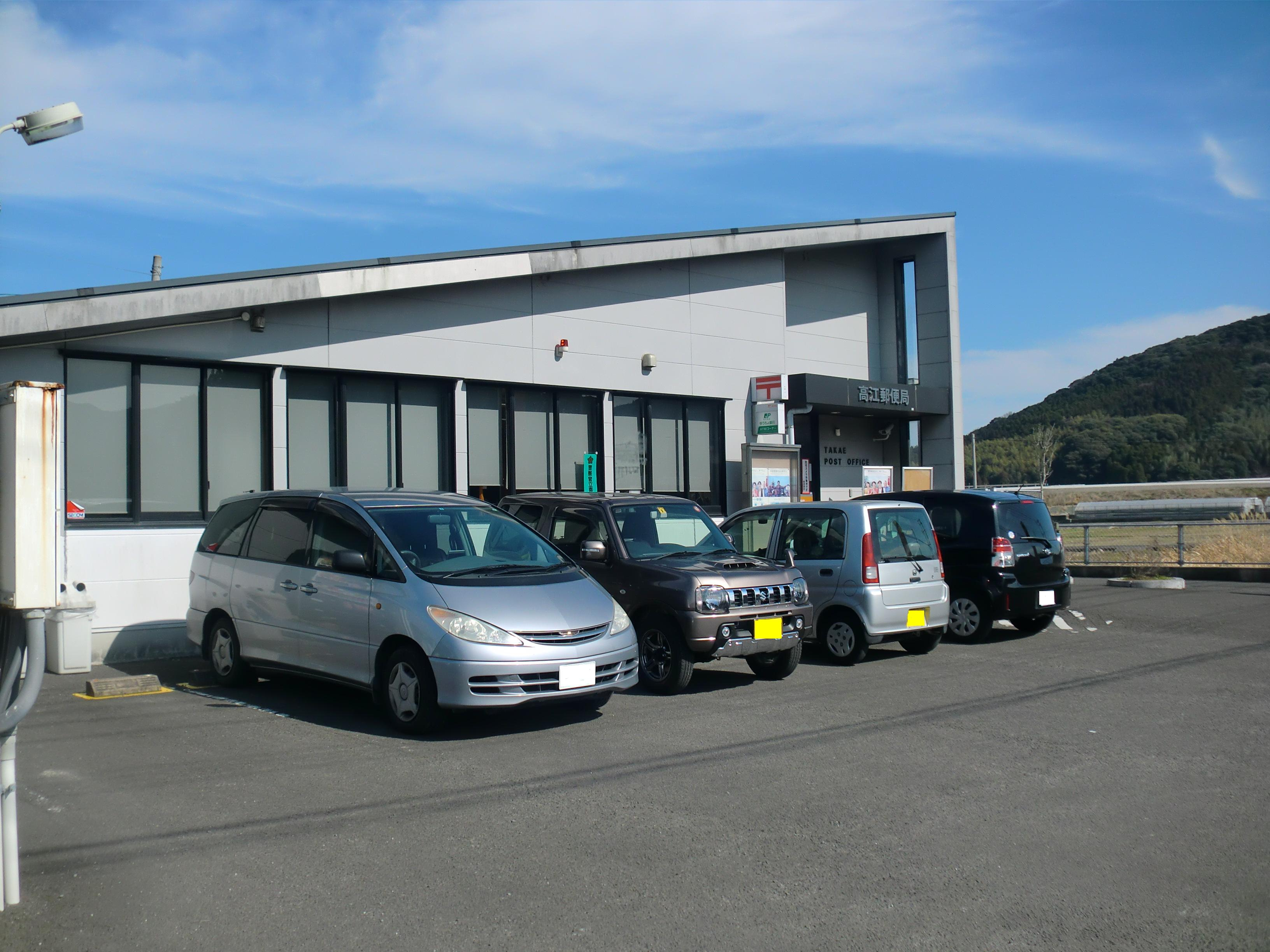 薩摩川内市にある高江（たかえ）郵便局